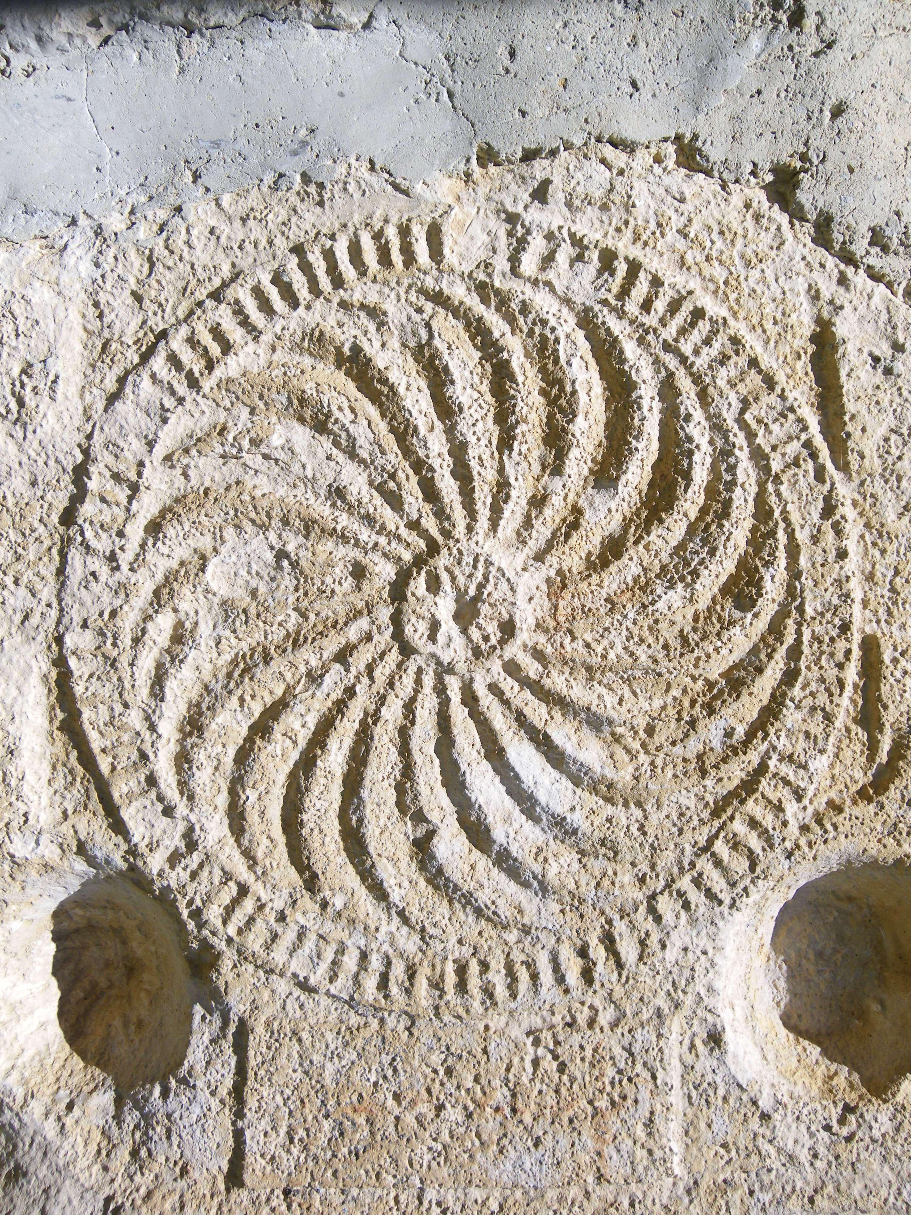 Elizmendiko Gure Amaren baselizako horman dagoen apaindura geometrikodun hilarria, Kontrasta, Harana, Araba, Euskal Herria.